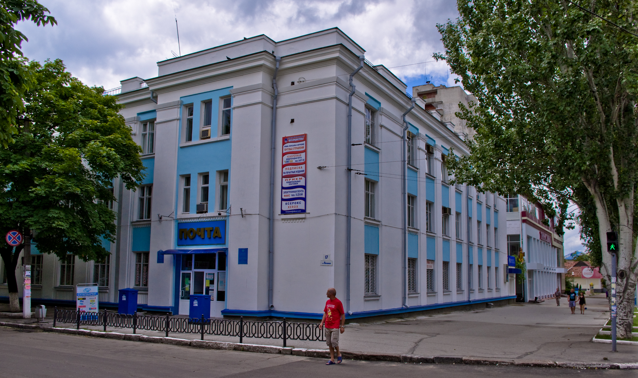 Государственное унитарное предприятие "Почта Приднестровья". Здание на фотографии находится в Тирасполе на перекрёстке улиц: 25 Октября и Ленина.